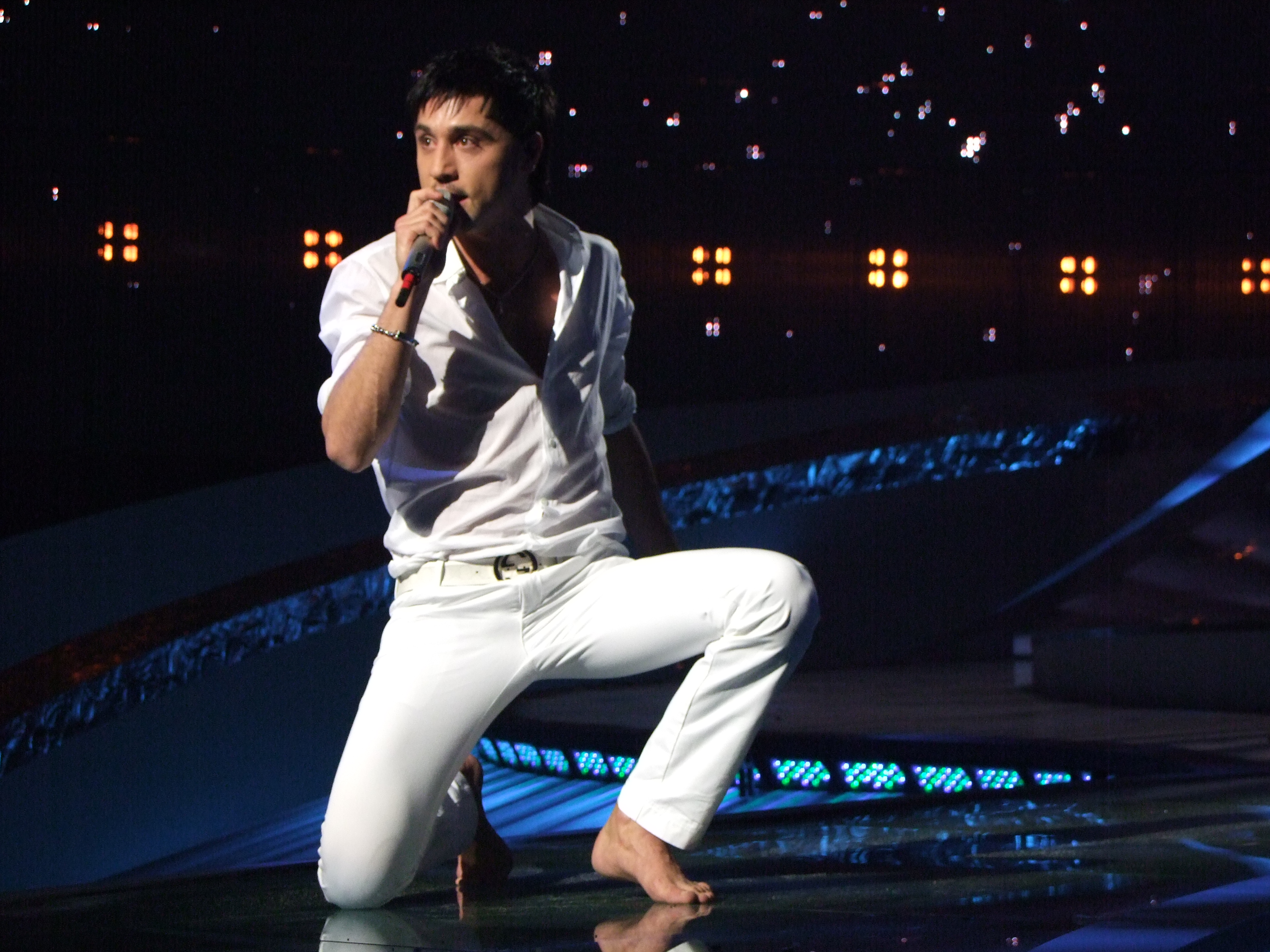 Semifinal 1 EUROVISION 2008